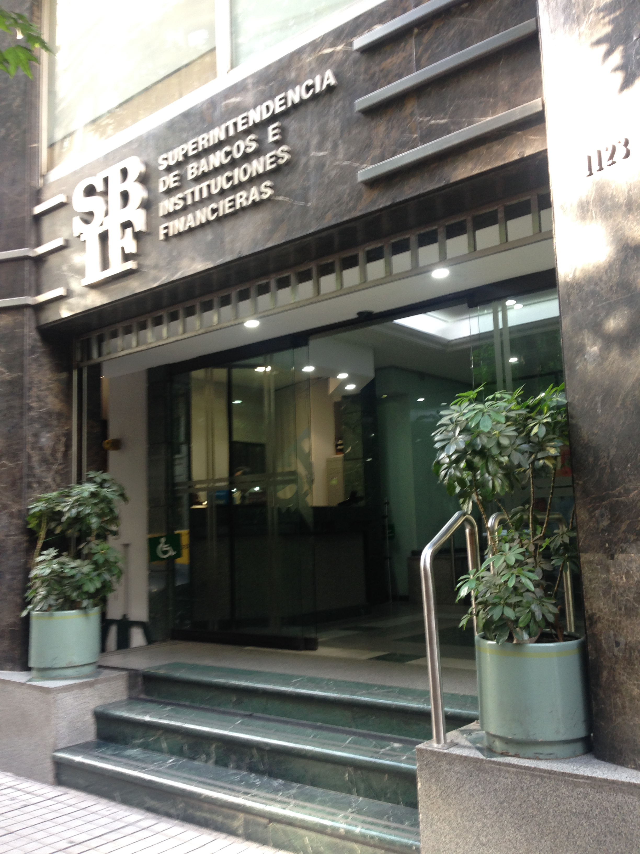 Acceso Principal por calle Moneda